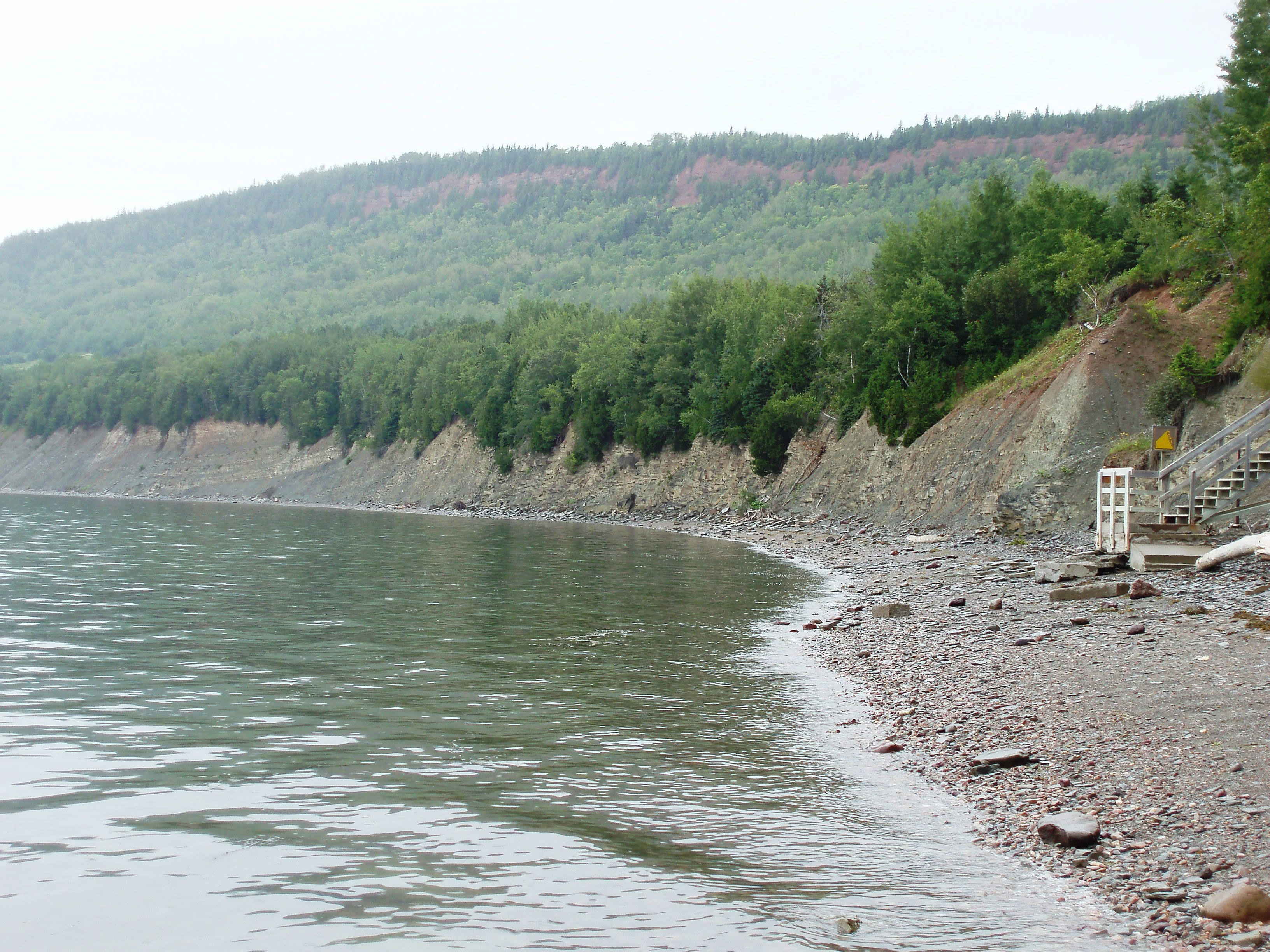 Falaise du Parc national de Miguasha (Québec), dans laquelle affleurent les couches dévoniennes riches en fossiles de poisson. Cliff of the Miguasha National Park (Québec), with the Devonian beds that are rich in fish fossils.